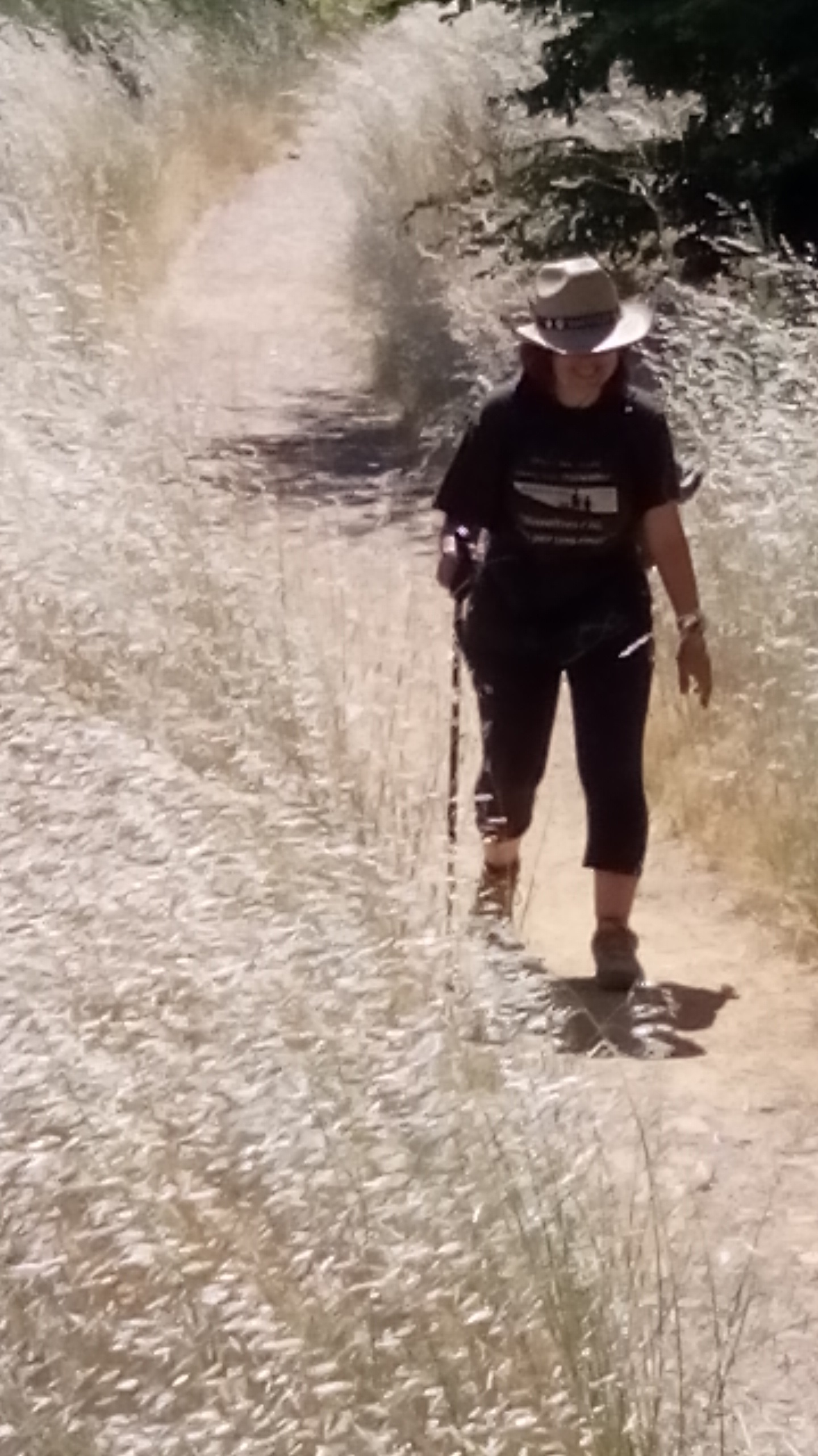 Fent senderisme